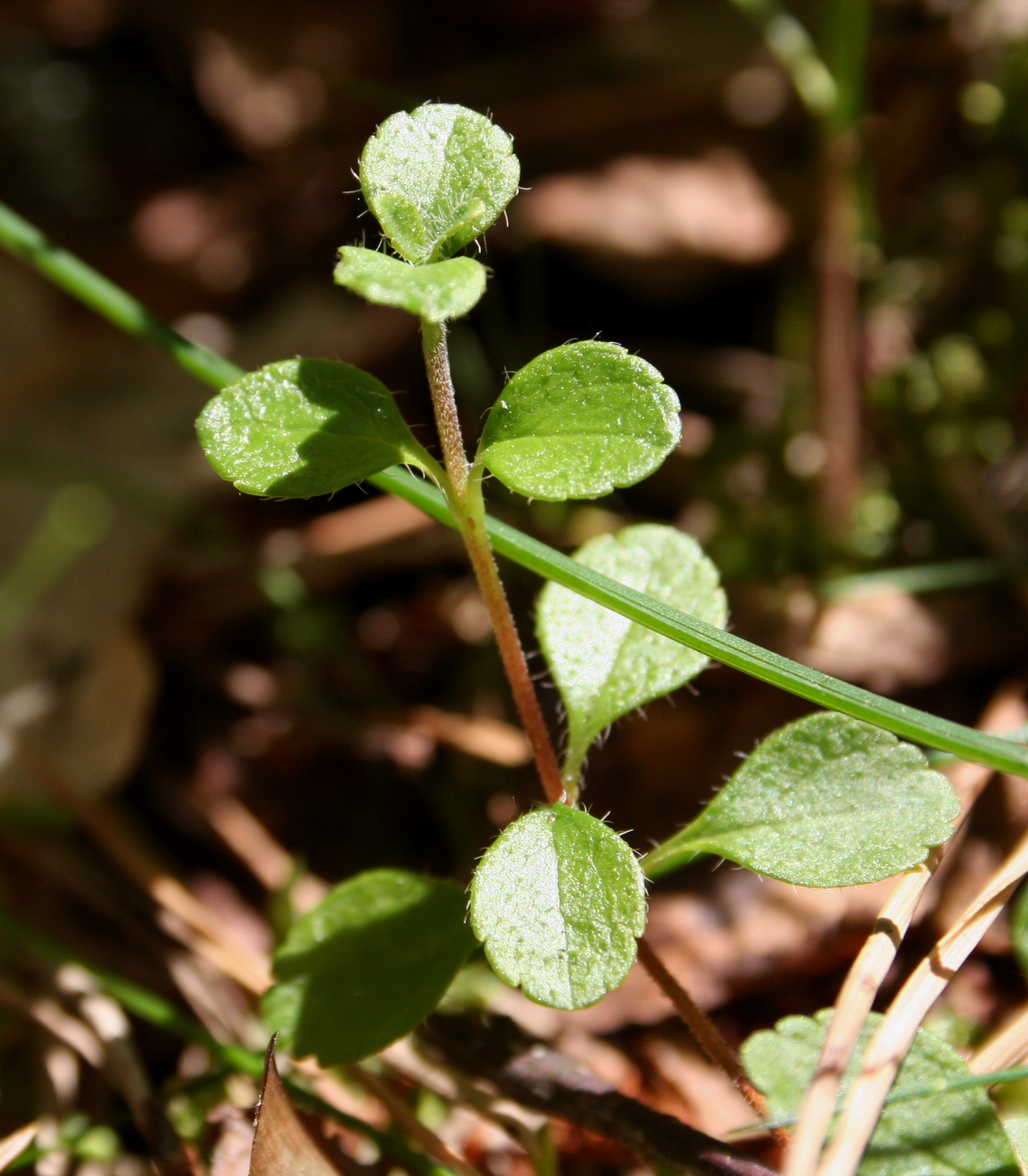 Zimoziół północny w Parku Narodowym Bory Tucholskie